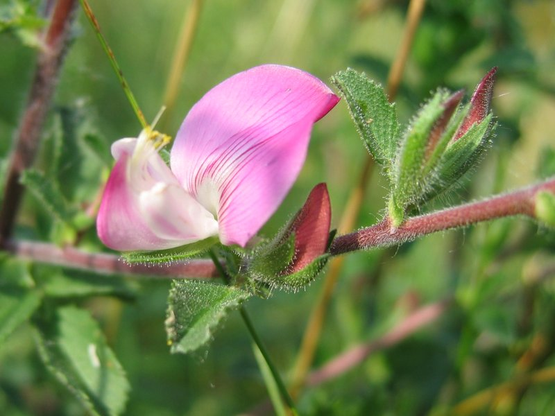 Acker-Hauhechel Ononis arvensis, Müritz-Gebiet